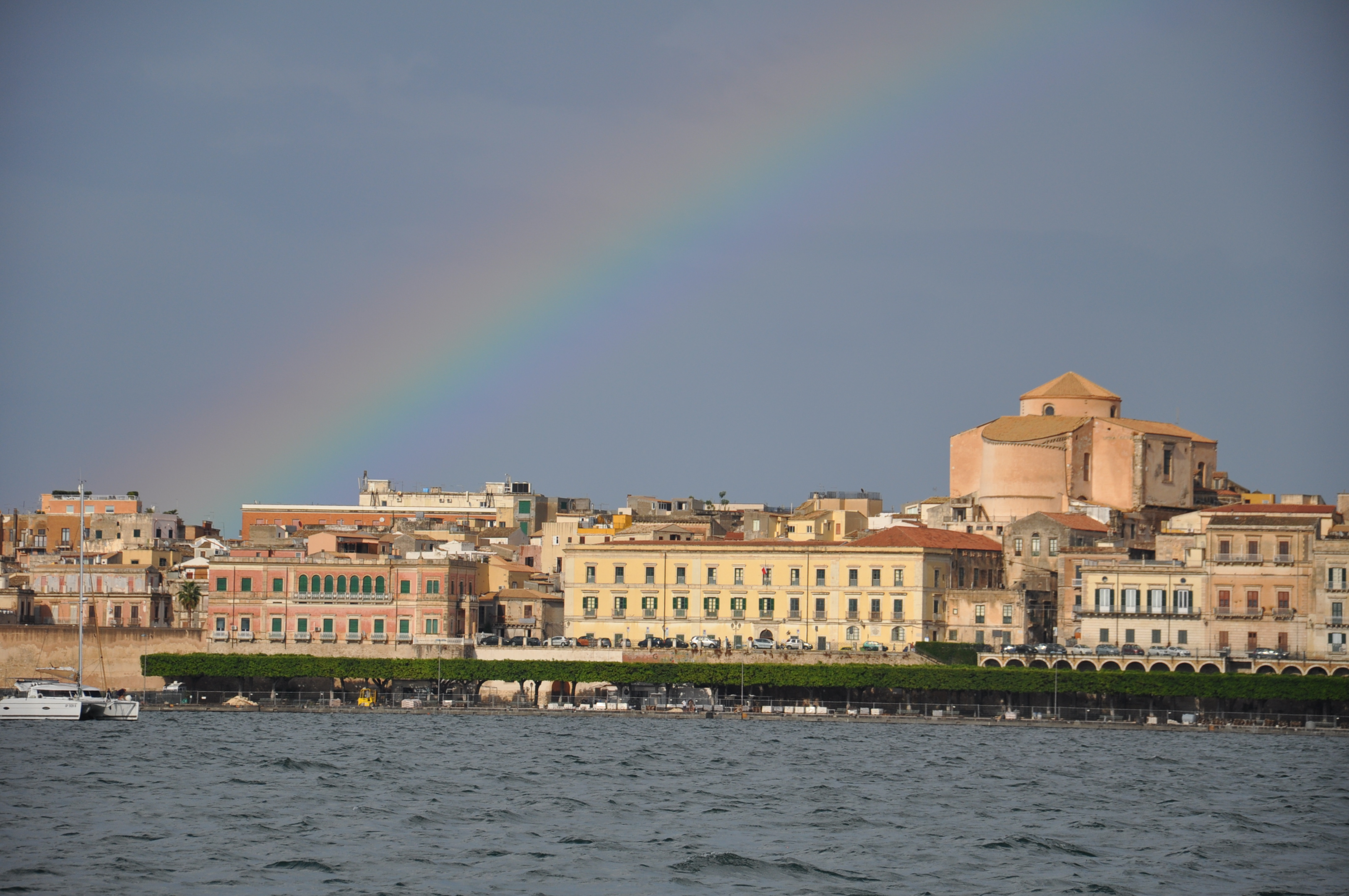 Ortigia - La Marina (Siracusa, Sicilia)